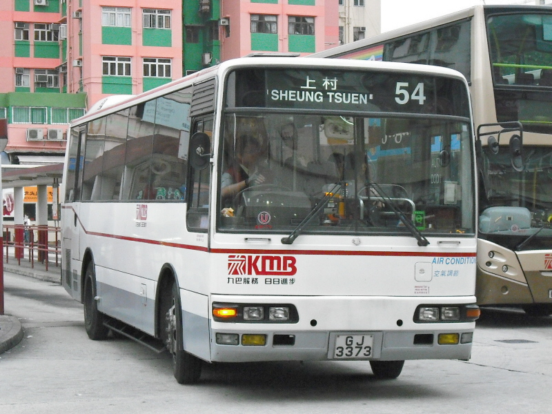 中文（香港）: 九巴54線巴士，攝於元朗西巴士總站。